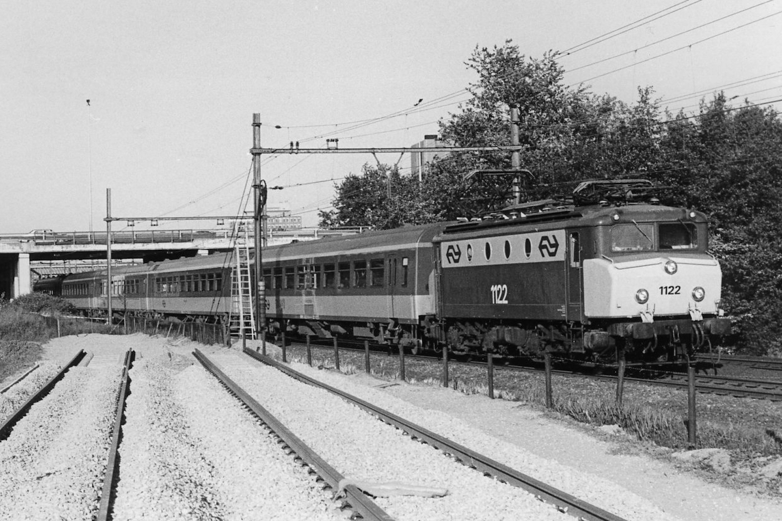 NS loc 1122 met IC-rijtuigen nabij Amsterdam-Sloterdijk